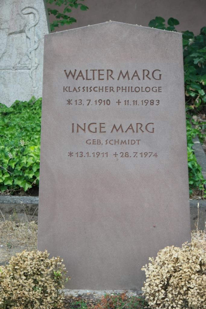 Grab des Philologen Walter Marg, 1910-1983, auf dem Hauptfriedhof Mainz